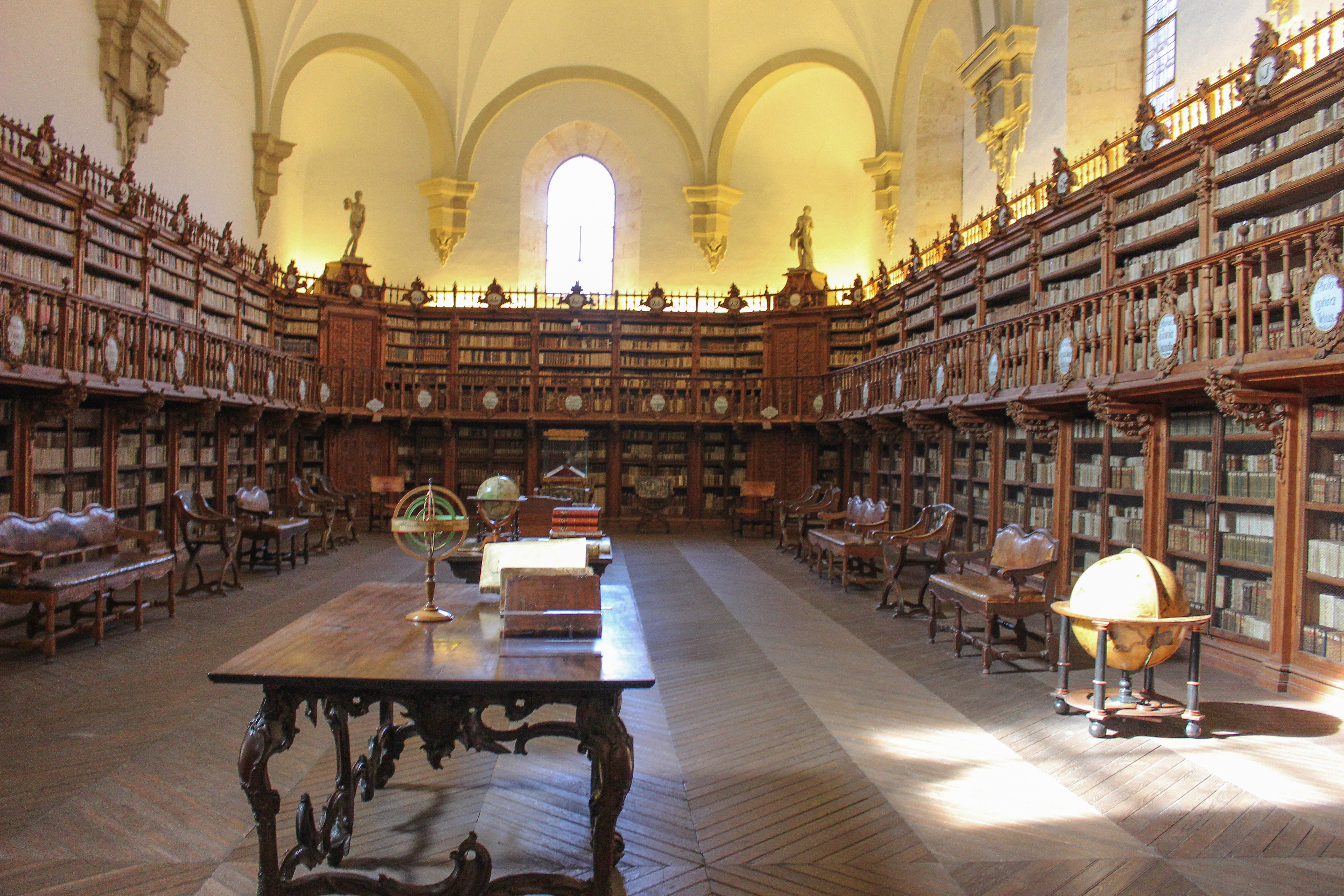 المكتبة القديمة في جامعة سلامنكا.